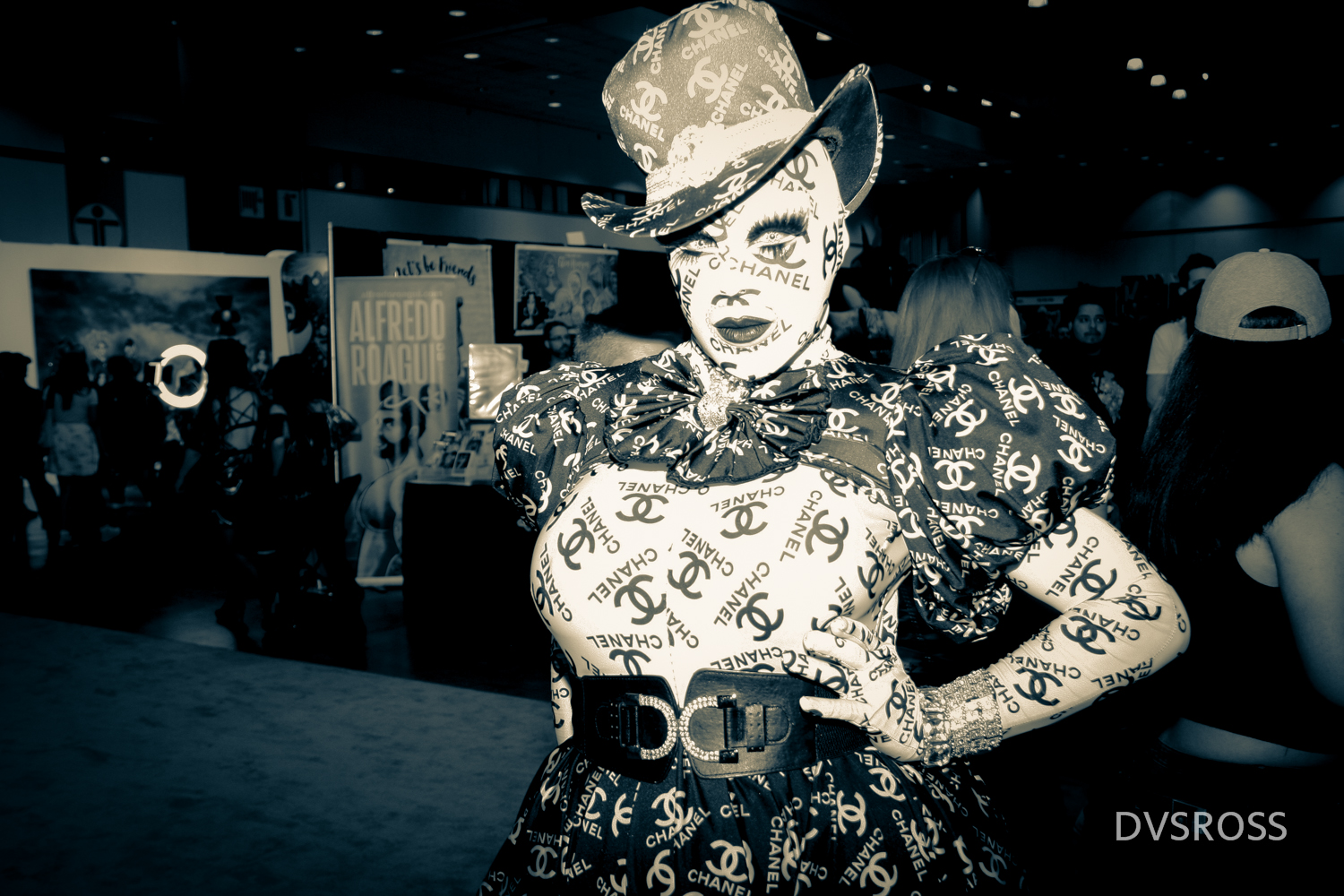 India Ferrah at RuPauls Drag Con 2017